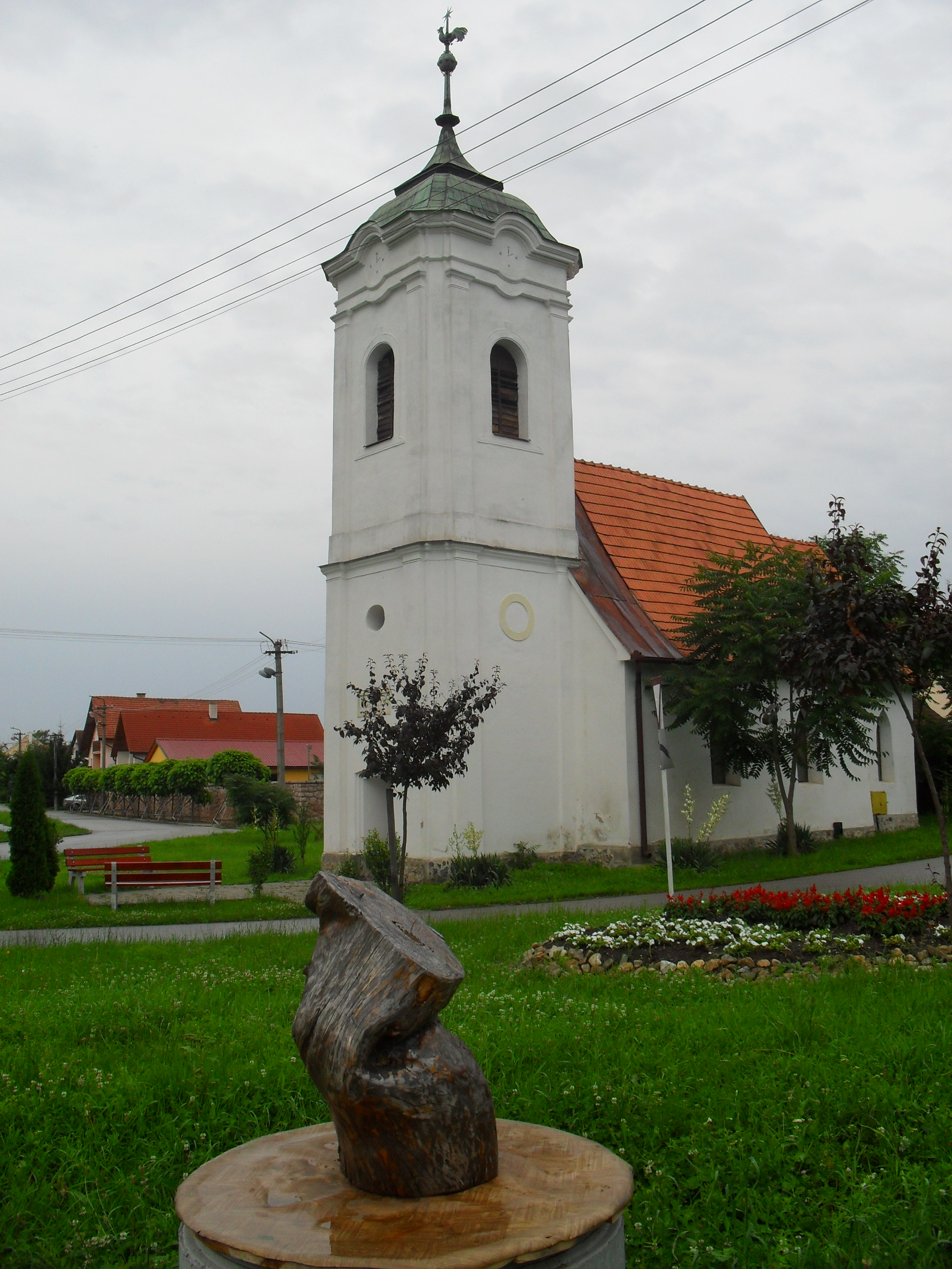 Tornalja/Sajókirályi - református templom